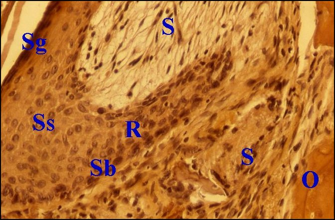 Epithélium avec une crête et stroma du cholestéatome